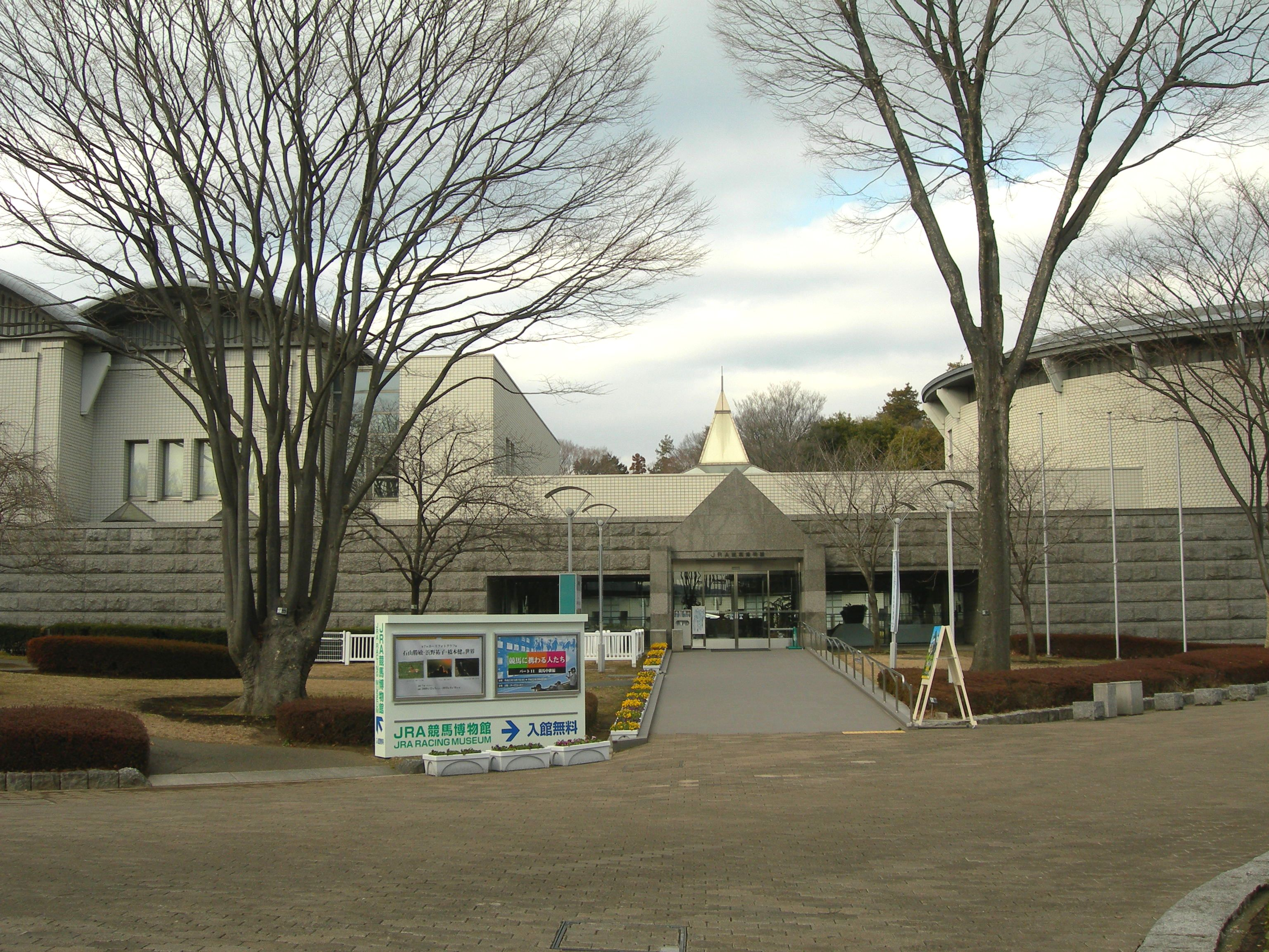 JRA競馬博物館（東京競馬場東門のすぐ横にある）